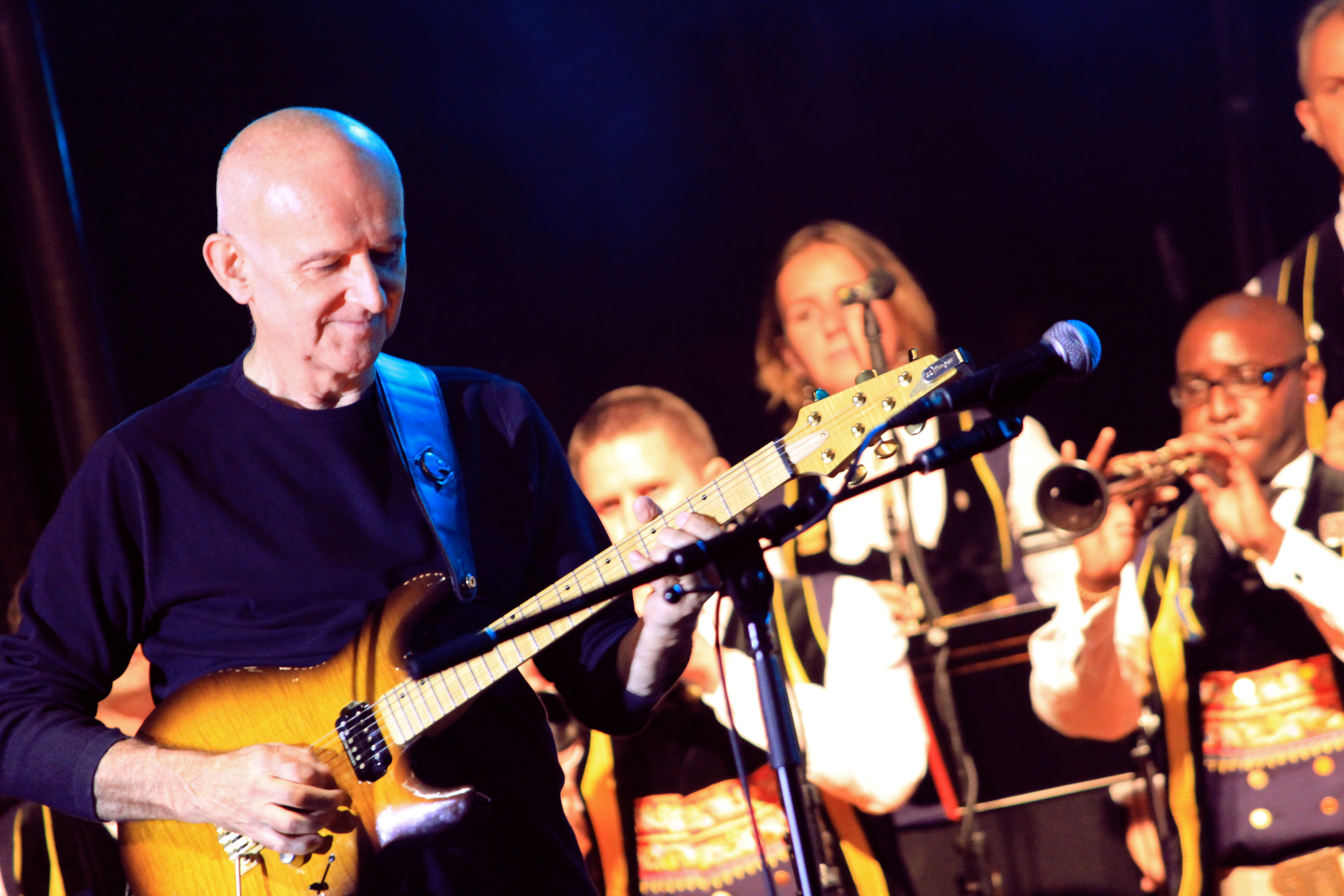 Dan Ar Braz et le Bagad Kemper lors de son concert inaugural de la tournée liée à la promotion de l'album Celebration, lors du Festival Interceltique de Lorient 2012.